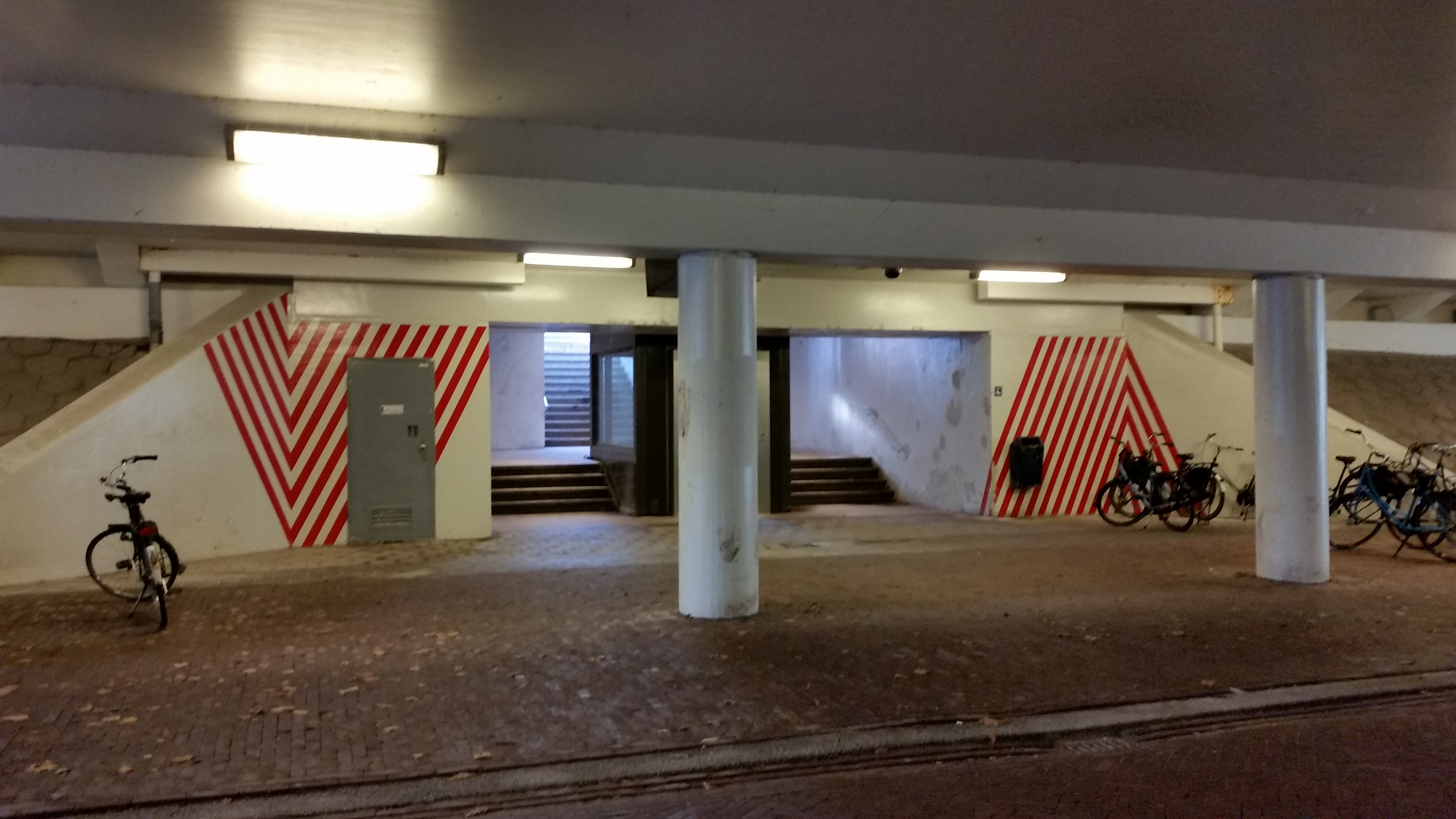 Onderdoorgang en trap naar sneltramhalte van Brug Uilenstede